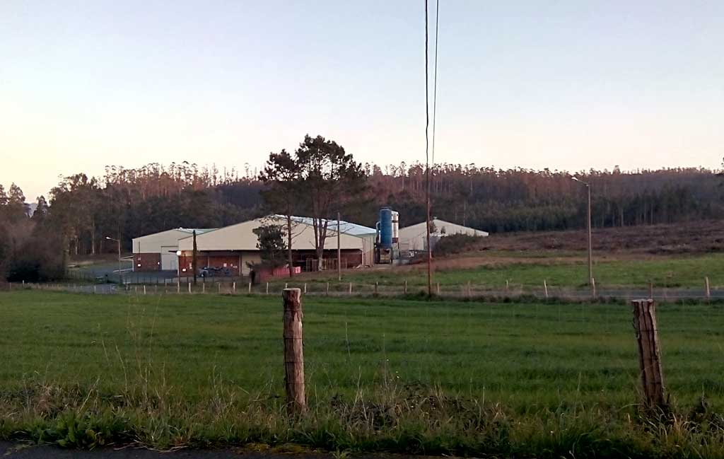 Cándido Hermida en Loira, Valdoviño.